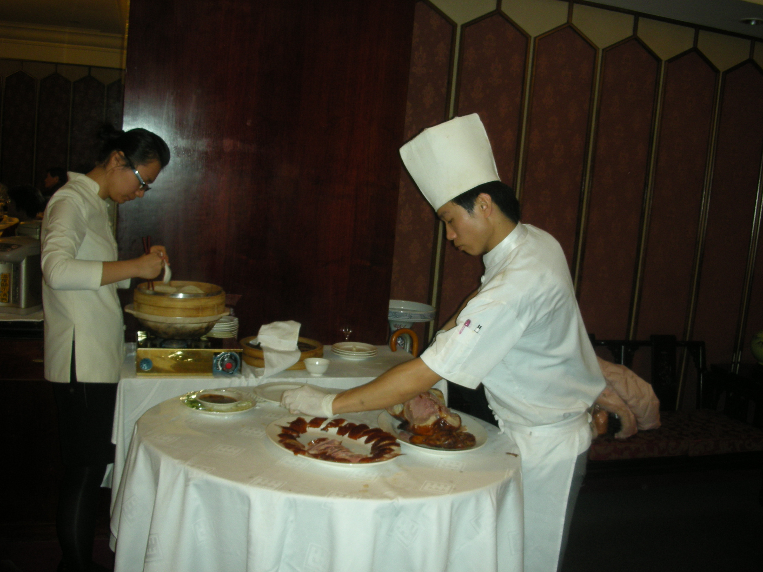 國賓飯店尾牙聚餐